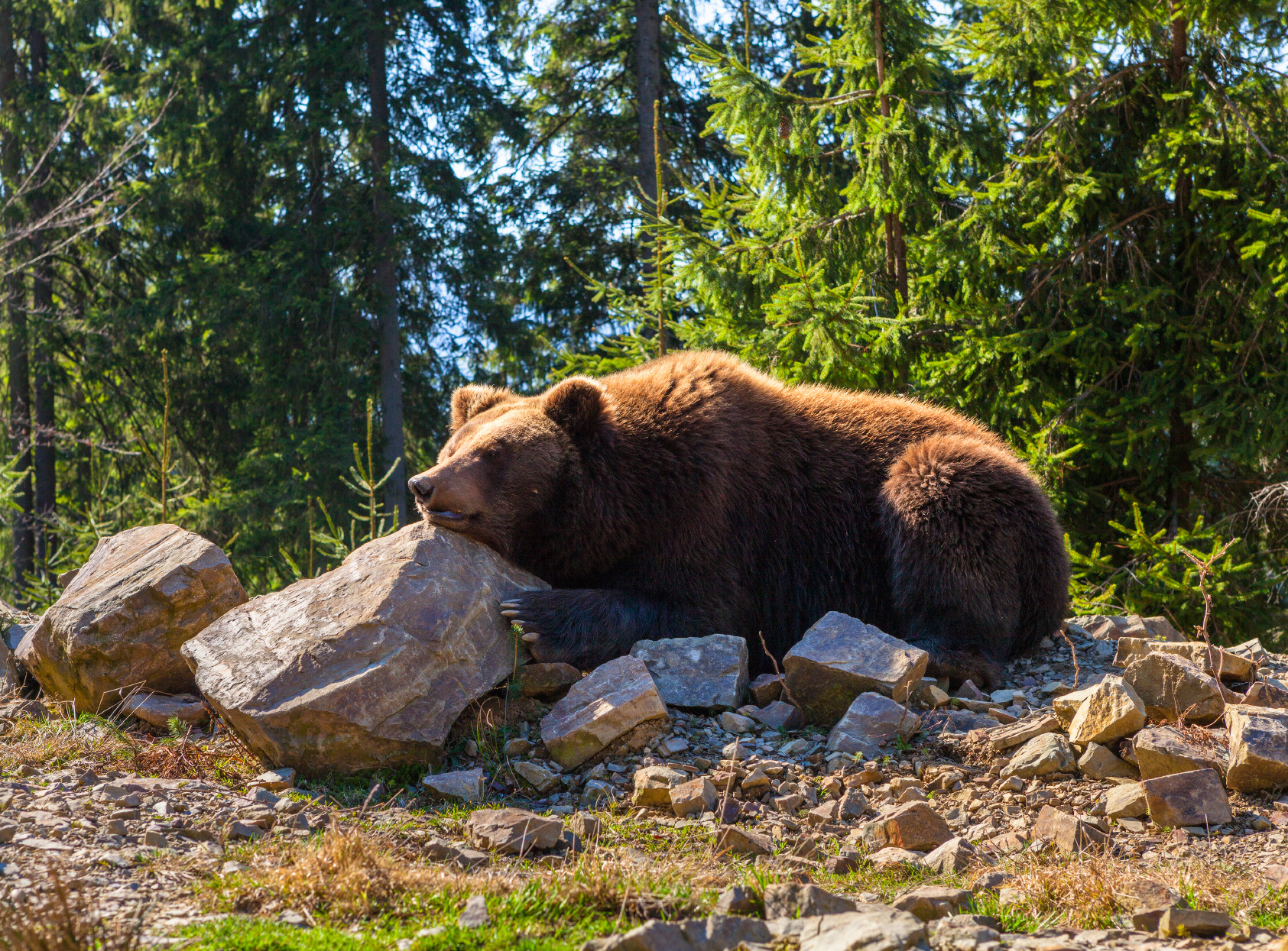 НПП** «Синевир», Міжгірський, Хустський райони